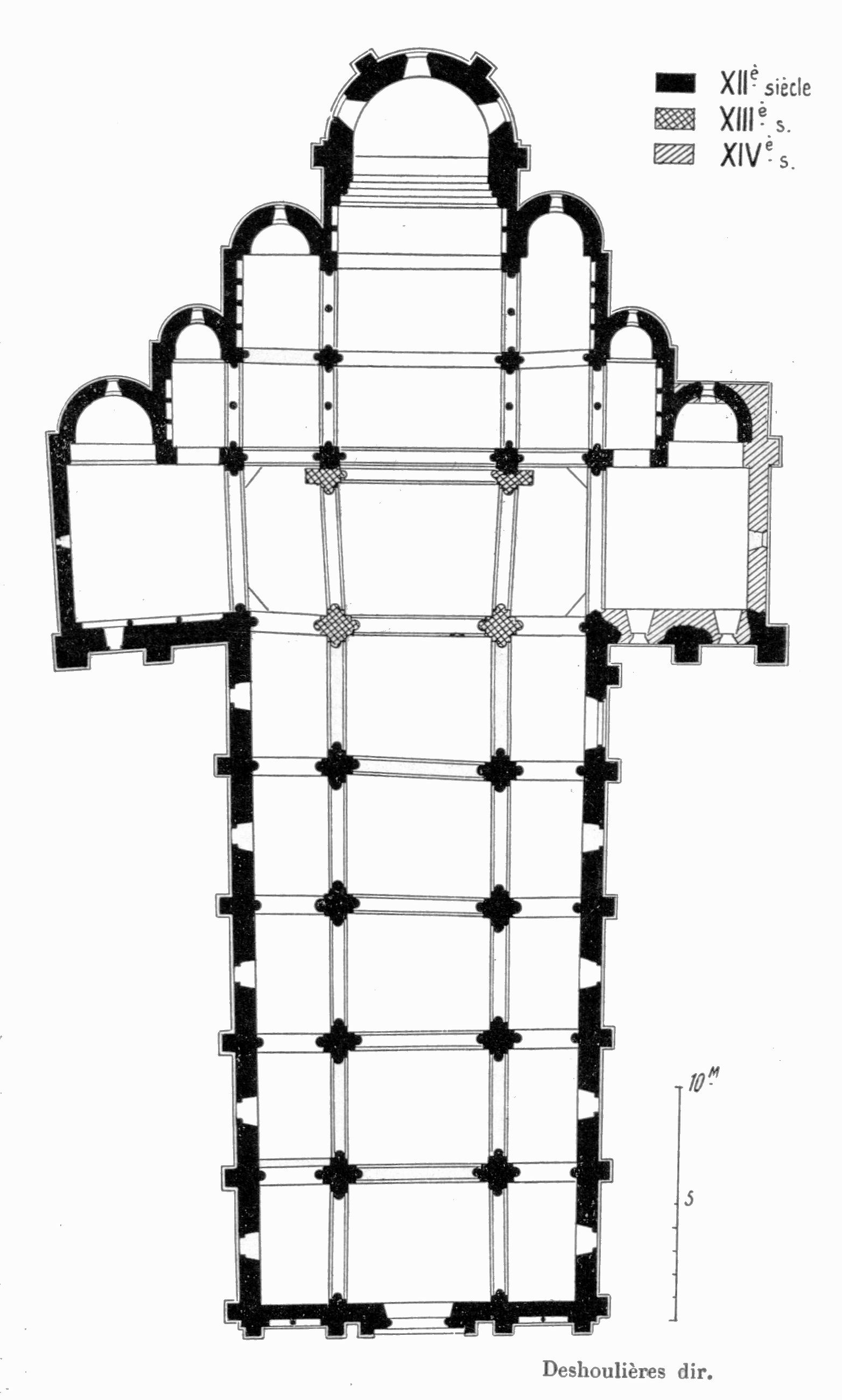 Châteaumeillant - Plan de l'abbatiale Saint-Genès (Congrès archéologique de France à Bourges, en 1931)